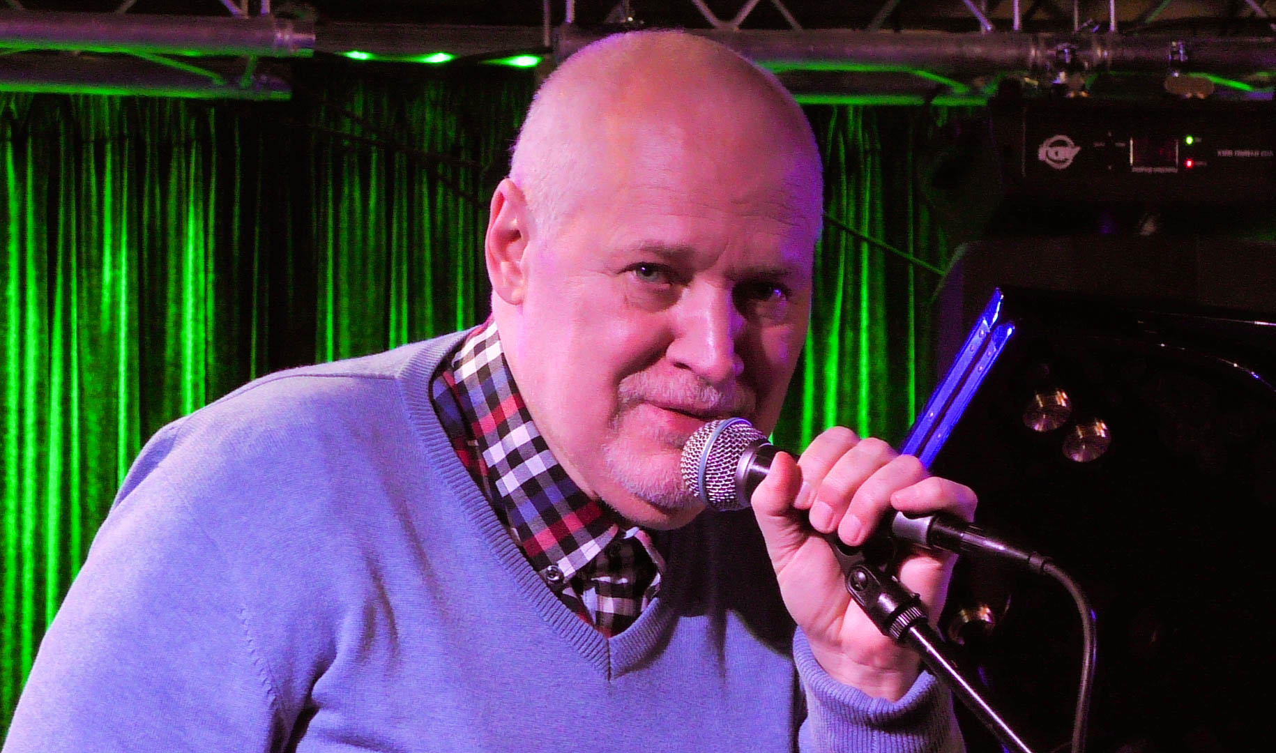 20.10.2017. Клуб Алексея Козлова. Творческая встреча с Тыну Найссоо.